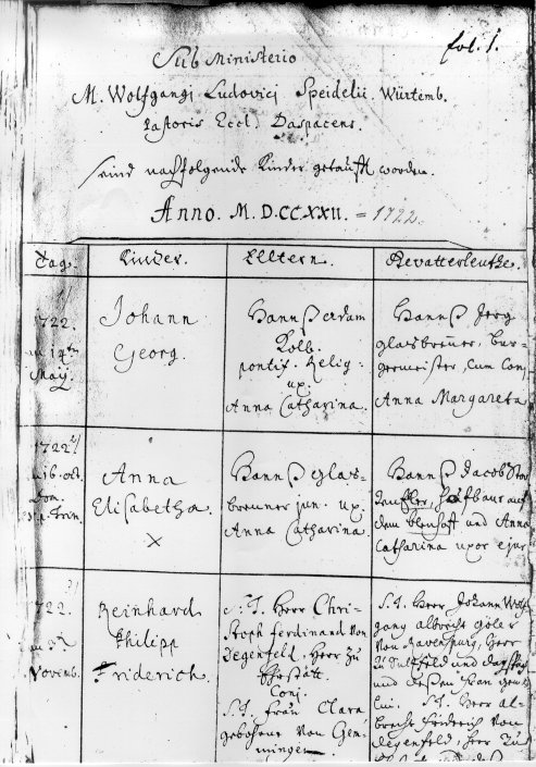 Kirchenbuch